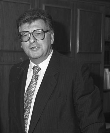 Title: Bonn, Jürgen Sudhoff, Philipp Jenninger Extra information: Bonn, Bundeshaus.- Von links: Dr. Jürgen Sudhoff, Dr. Philipp Jenninger People in the image: Sudhoff, Jürgen Dr. jur. (Stellvertretender Regierungssprecher, FDP, Botschafter), Bundesrepublik Deutschland * Jenninger, Philipp Dr. (Staatsminister im Bundeskanzleramt, Präsident des Bundestages, CDU), Bundesrepublik Deutschland Factual corrections and alternative descriptions are encouraged separately from the original description. Additionally errors can be reported at this page to inform the Bundesarchiv. Original historic description: 15.5.1987 Der Präsident des Deutschen Bundestages, Dr. Philipp Jenninger (rechts), empfängt den neuen Staatssekretär des Auswärtigen Amtes, Dr. Jürgen Sudhoff, zum Antrittsbesuch im Bundeshaus.